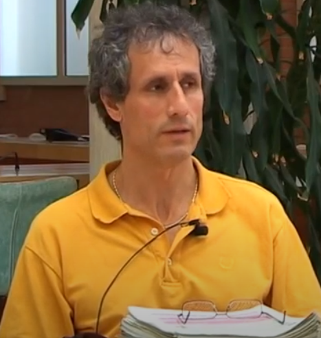 Paolo Barnard in un'intervista nel 2014, immagine ritagliata digitalmente